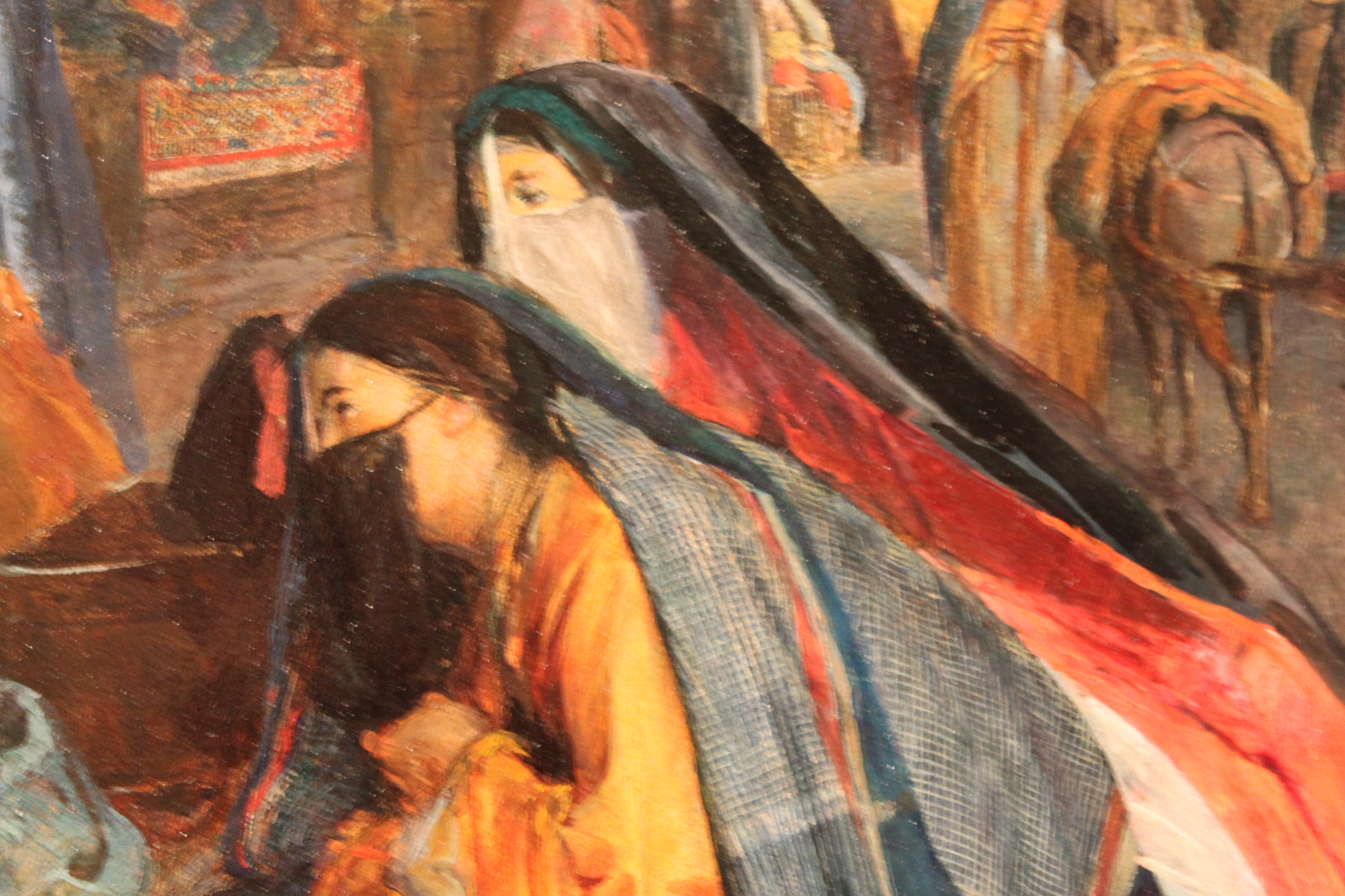 Détail de : La Rue et la Mosquée El Ghouri au Caire, tableau de John Frederick Lewis, Musée du Louvre, Paris